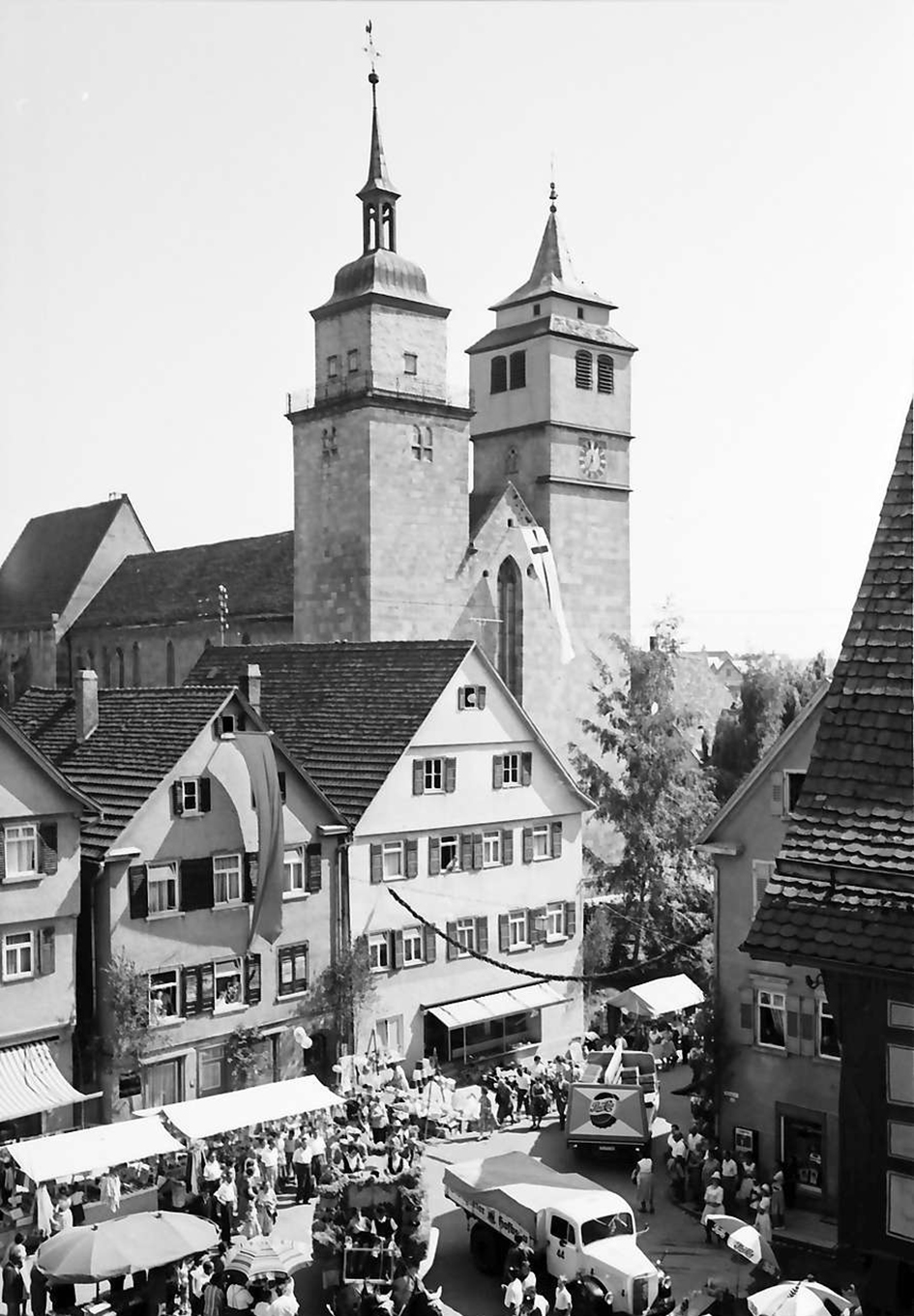 Schäferlauf Markgröningen 1961: Blick vom Rathaus über den Marktplatz auf die Bartholomäuskirche